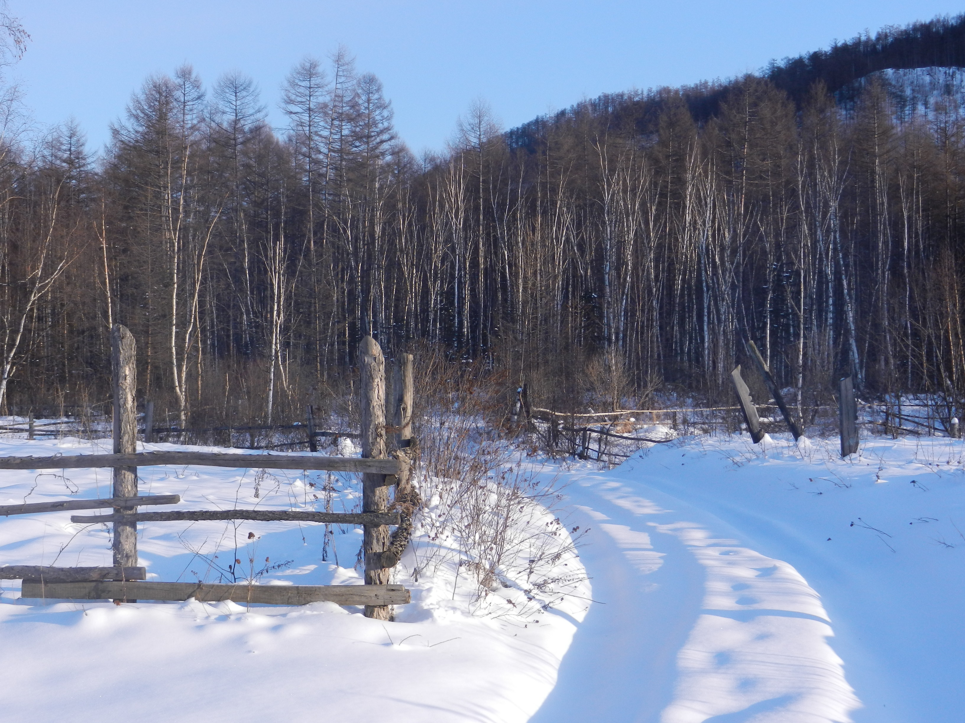 Окрестности посёлка зимой